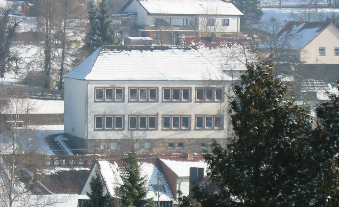 Schulhaus in Heckendalheim, erbaut 1930